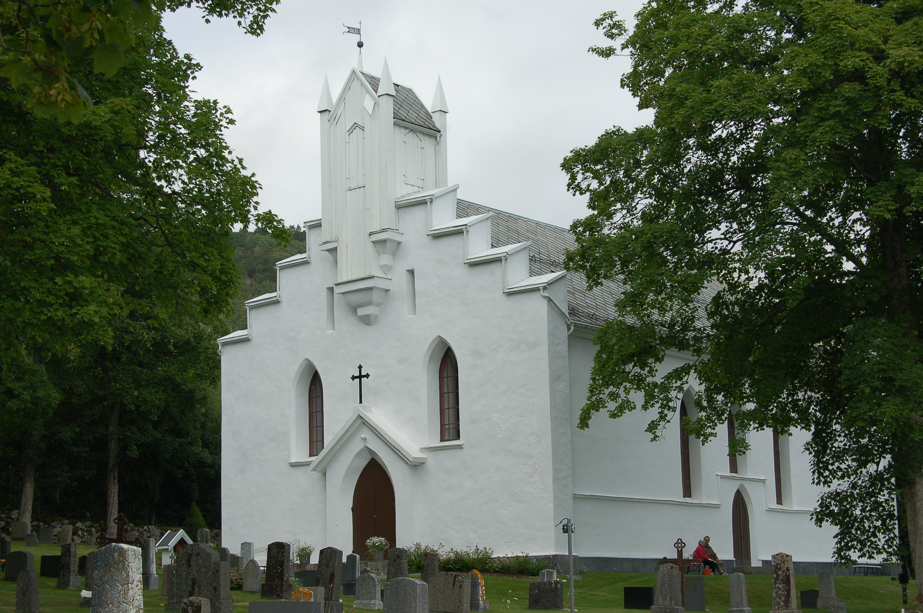 Hegvik kirke